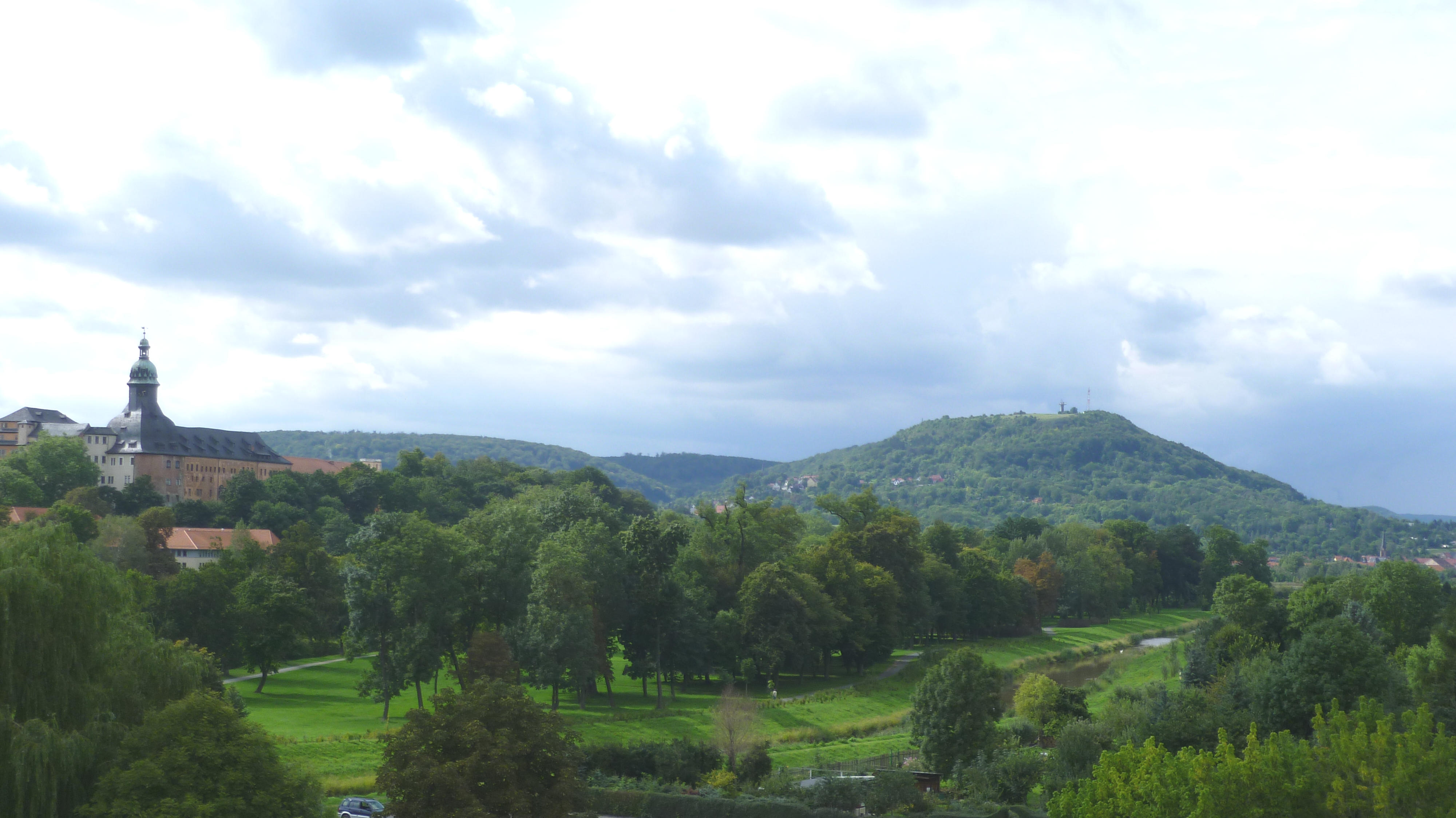 Sondershausen: Schlosspark, Schloss und Frauenberg; hinten links: Jechaburg, rechts: Stockhausen